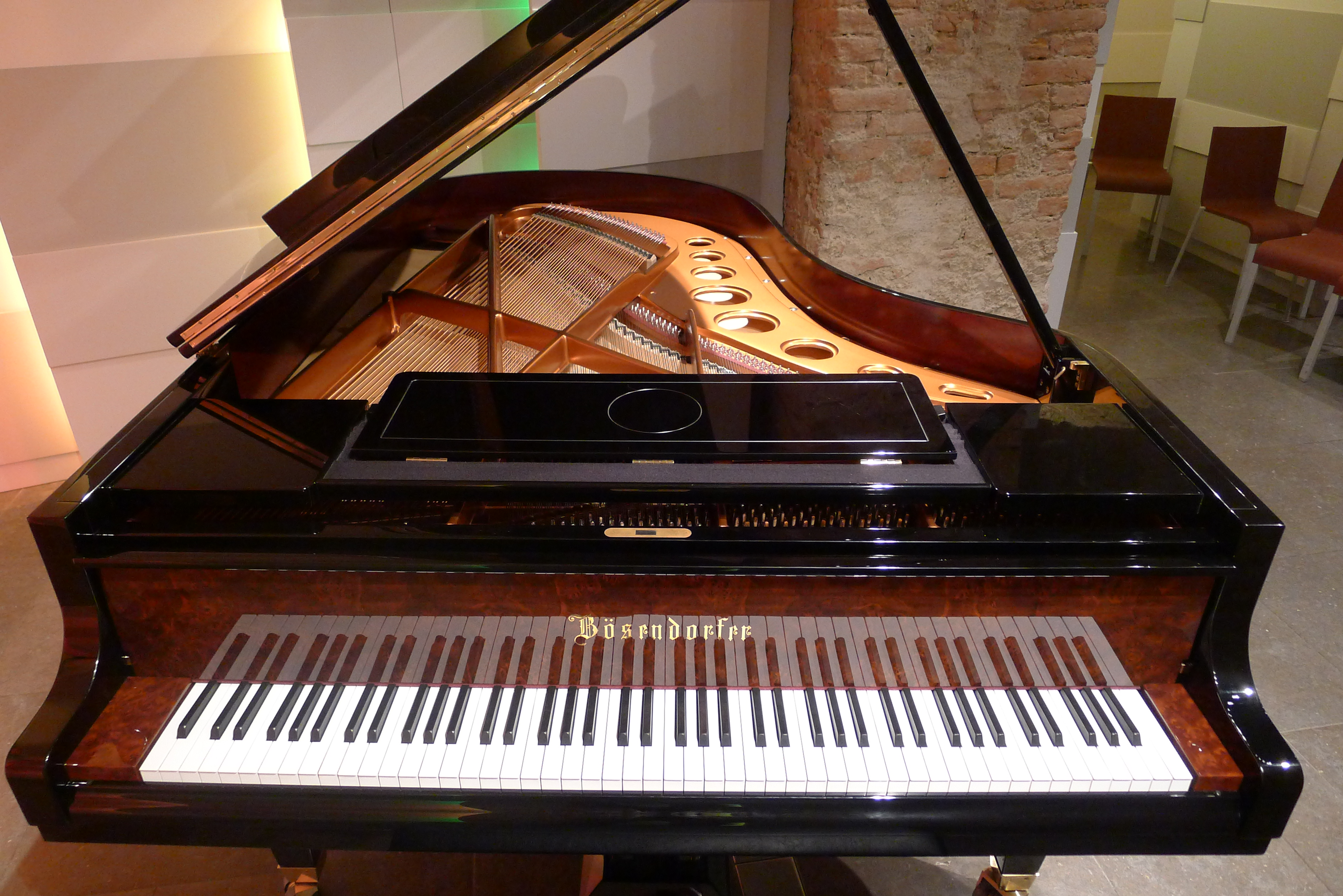 "Bösendorfer Saal Wien Bösendorfer Grand Piano in Vienna, Mozart House"— Robert Douglass